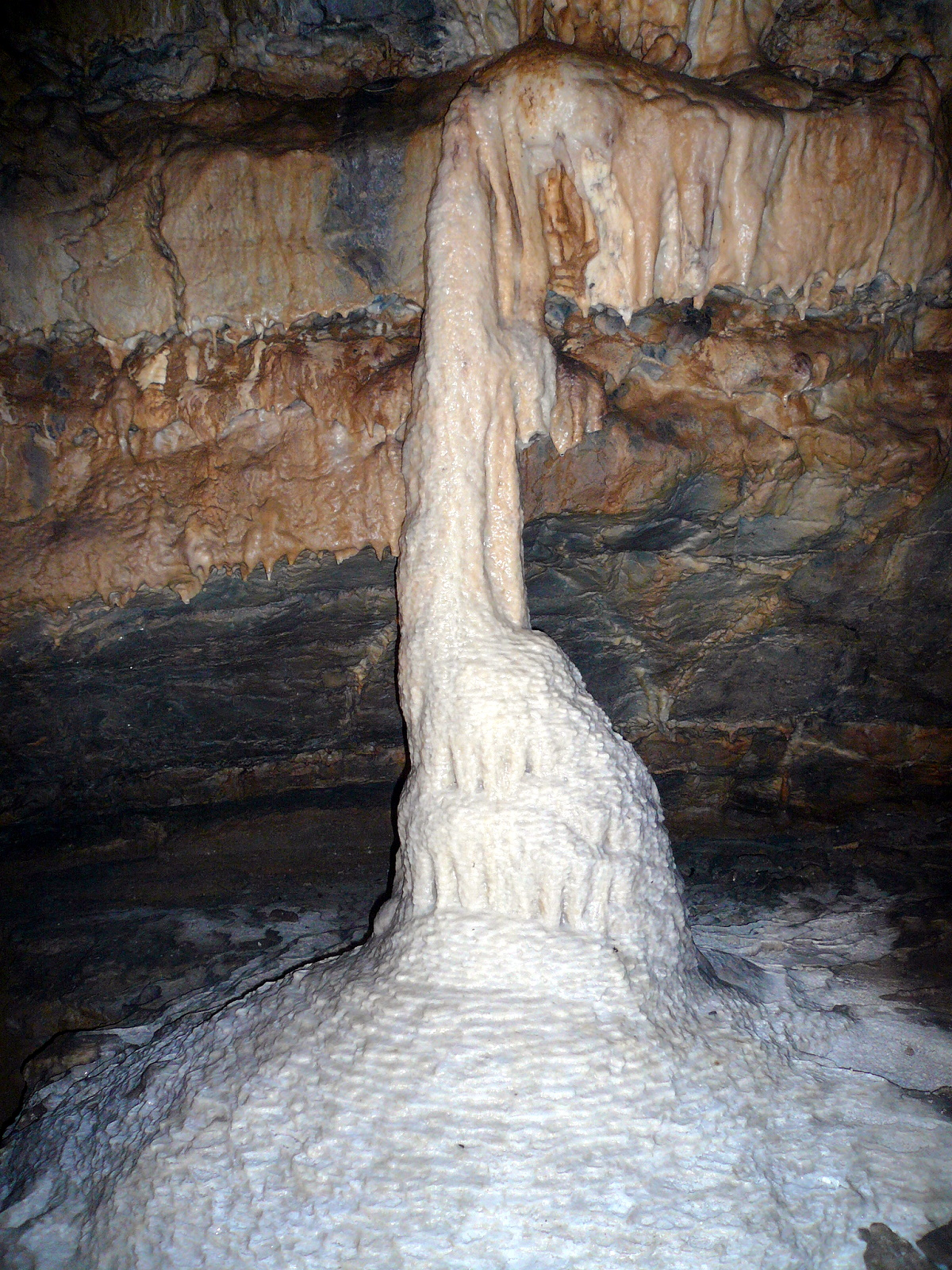 Heinrichshöhle